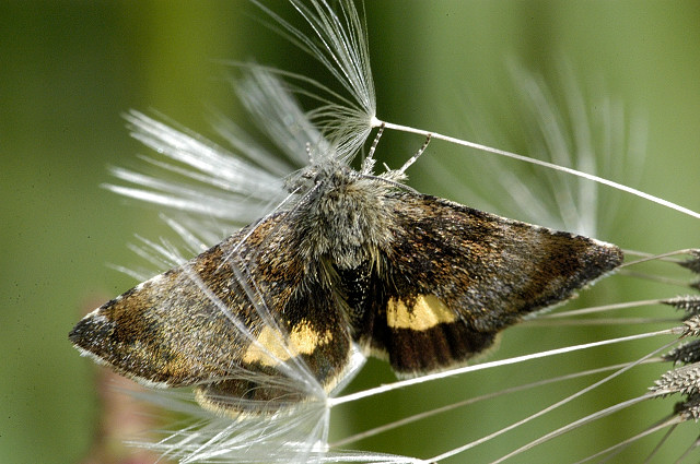 Picture taken in Commanster, Belgian High Ardennes .